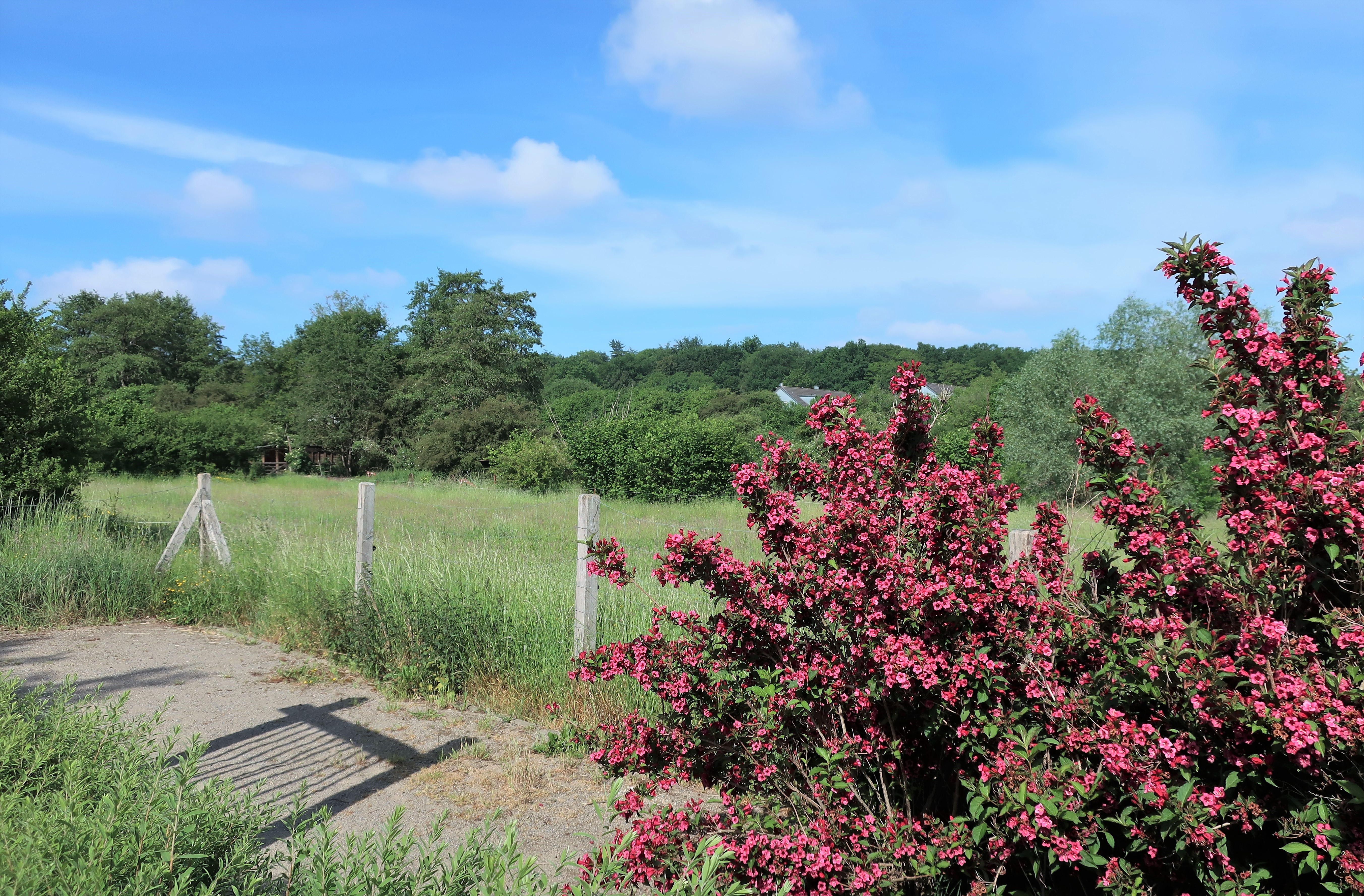 Geschützer Landschaftsbestandteil 1.4.2.13 „Knippschildbachtal“ in Hagen, westlich von Fley. Es handelt sich um ein feucht-nasses Wiesental des Knippschildbaches mit Zuläufen sowie randständigen Feldhecken und einigen Kopfbäumen. Im Norden schließt sich ein gehölzbestandener Siepen an.